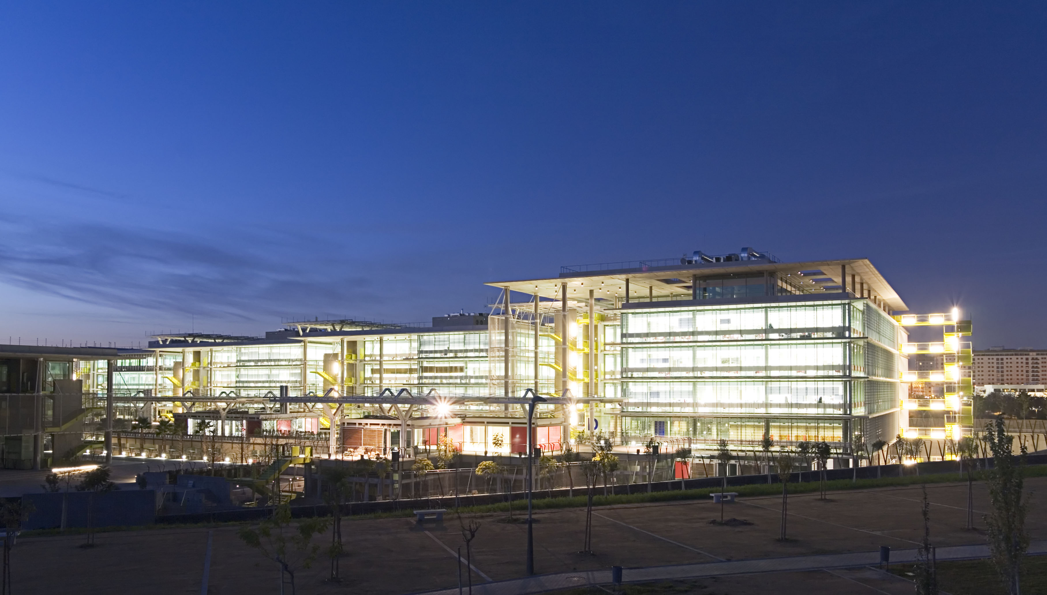 Centro Tecnológico Palmas Altas